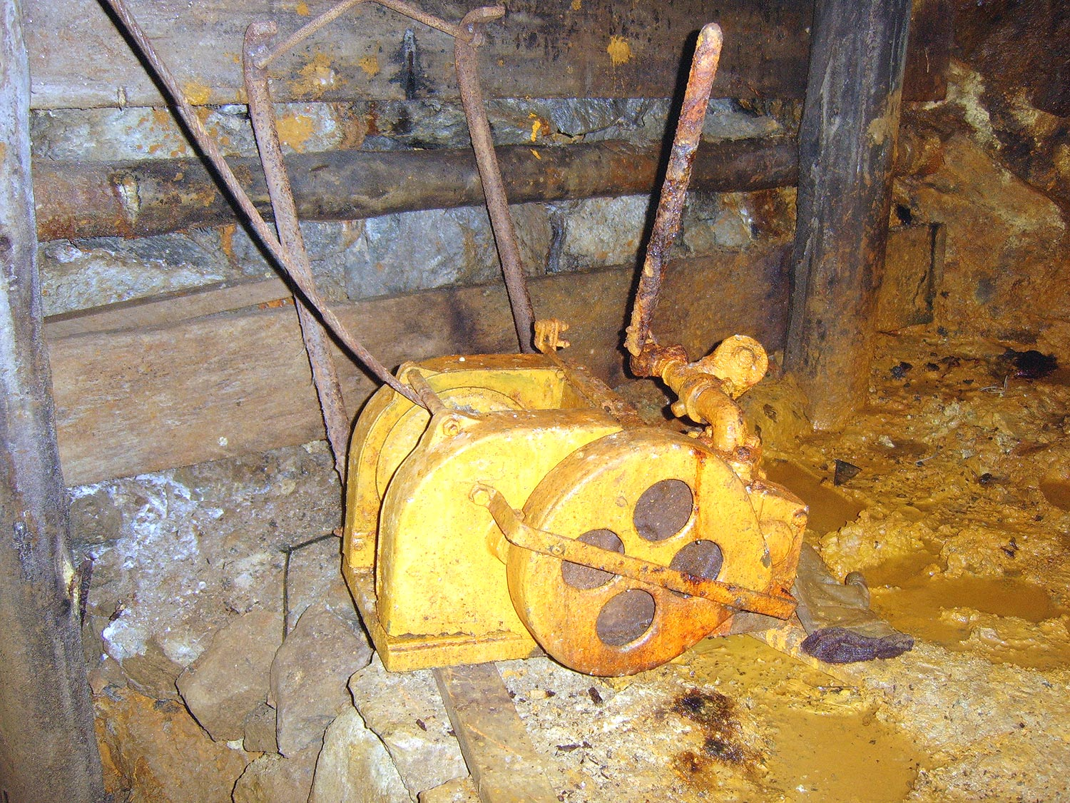 Presslufthaspel in der Freiberger Grube "Reiche Zeche".